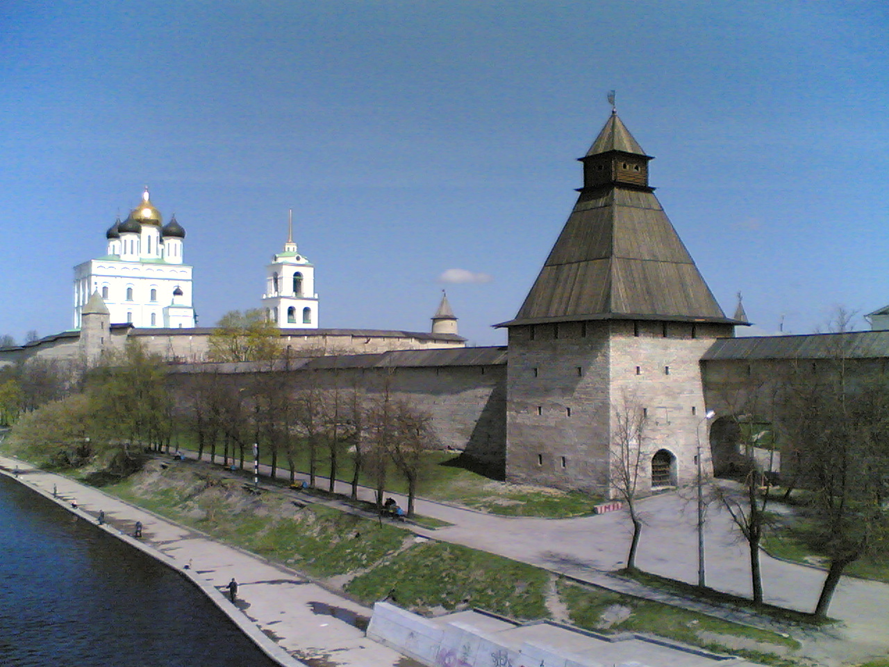 Власьевская башня и Псковский Кром